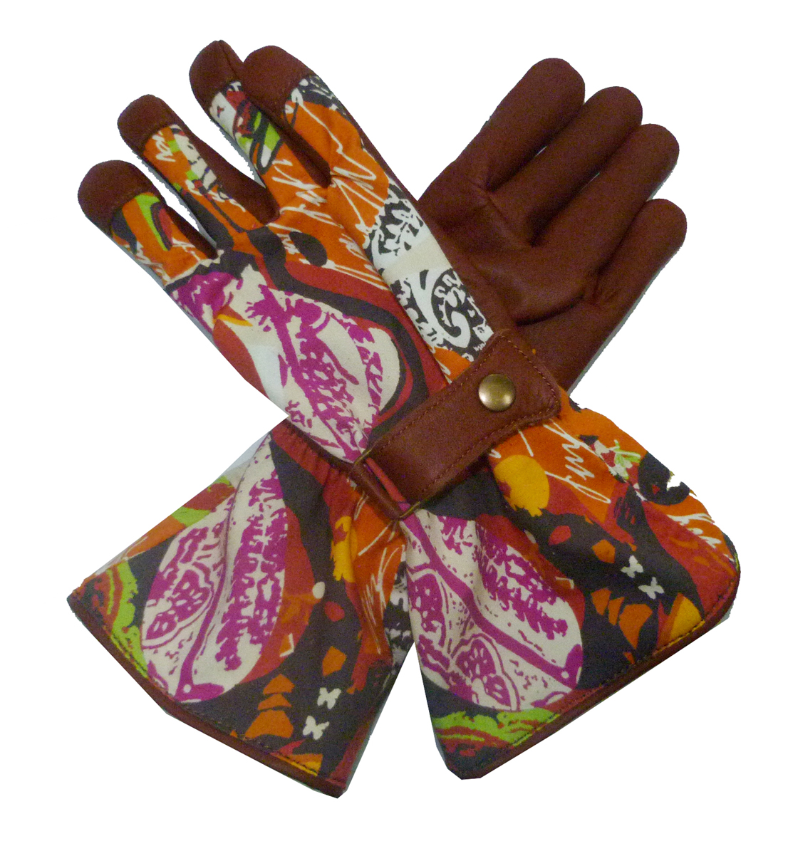 gant nature